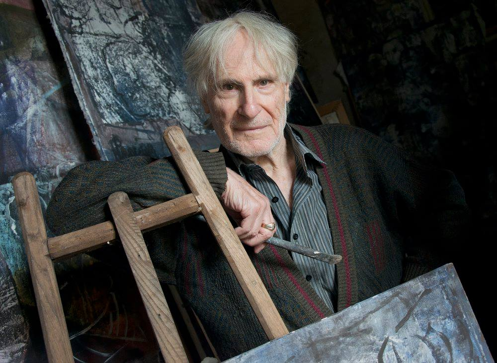 Roberto Panichi in studio